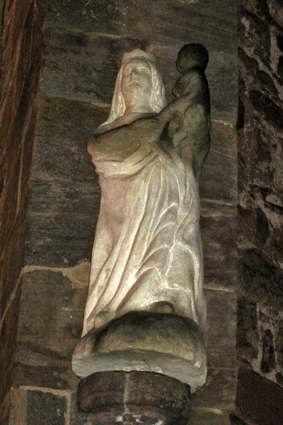 Gotische Madonnenfigur auf dem Sims im hessischen Naumburg